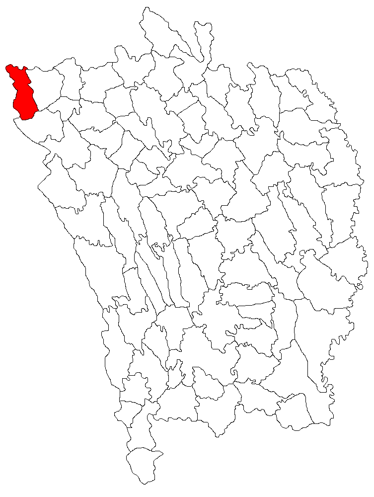 Categorie:Hărţi ale judeţului Vaslui